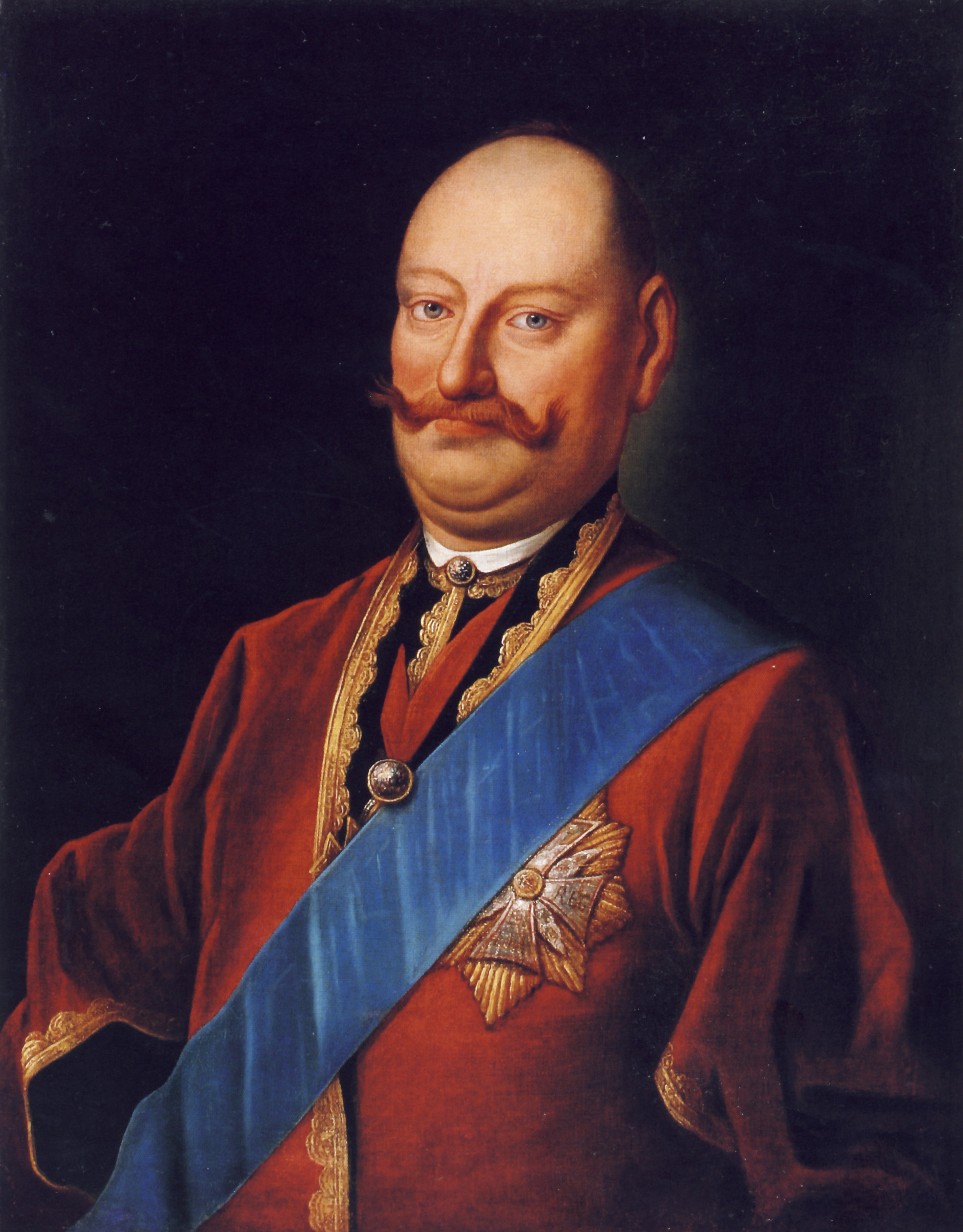 Portrait of Karol Stanisław "Panie Kochanku" Radziwiłł (1734-1790)